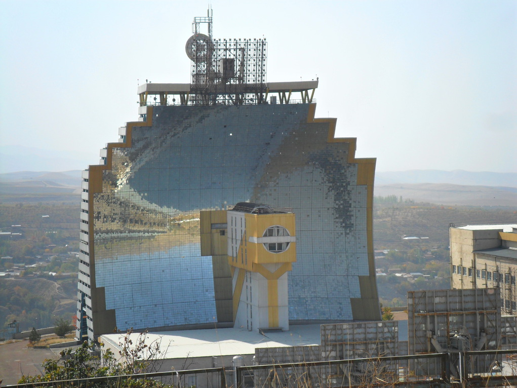 Большая солнечная печь в Паркенте, концентратор солнечных лучей